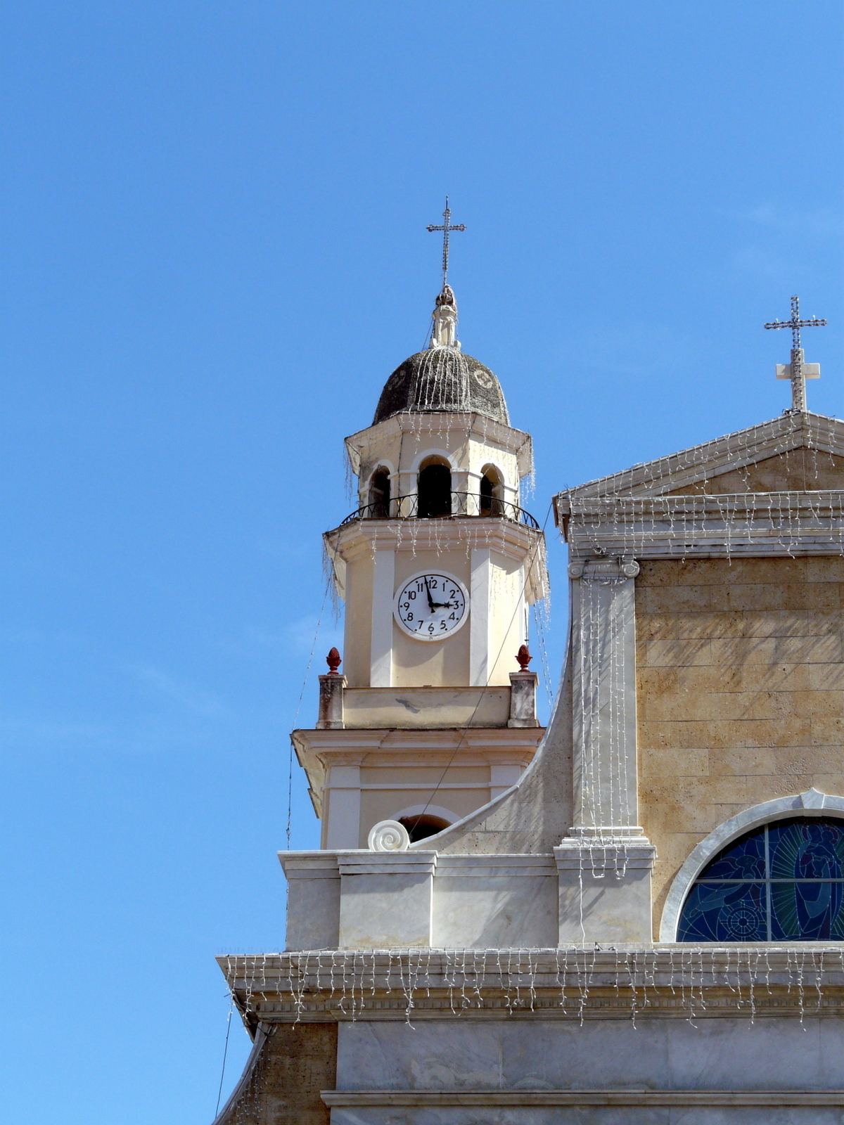 Chiesa di San Pietro, Riva, Sestri Levante, Liguria, Italia